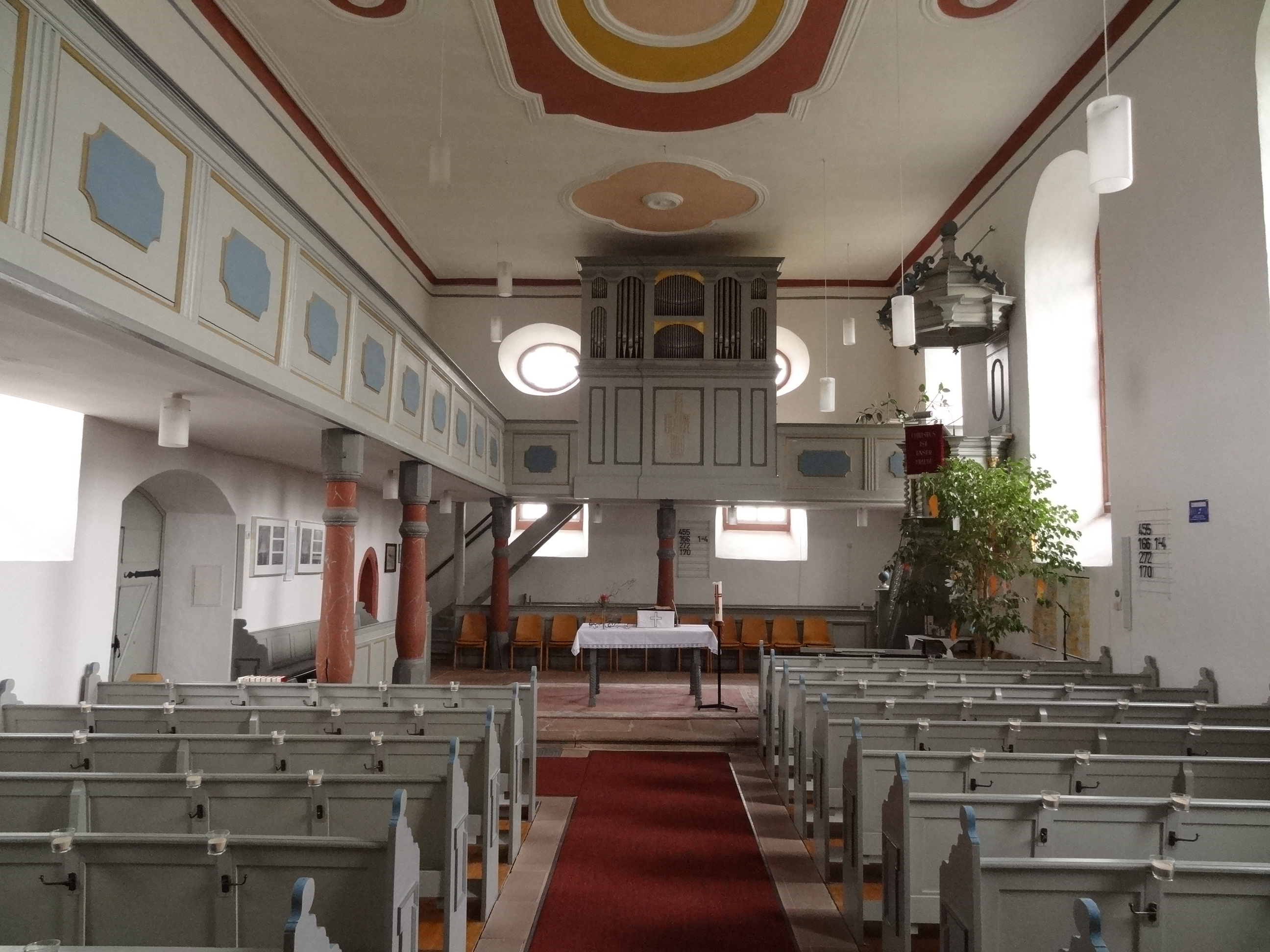 Evangelische Kirche Ober-Hörgern